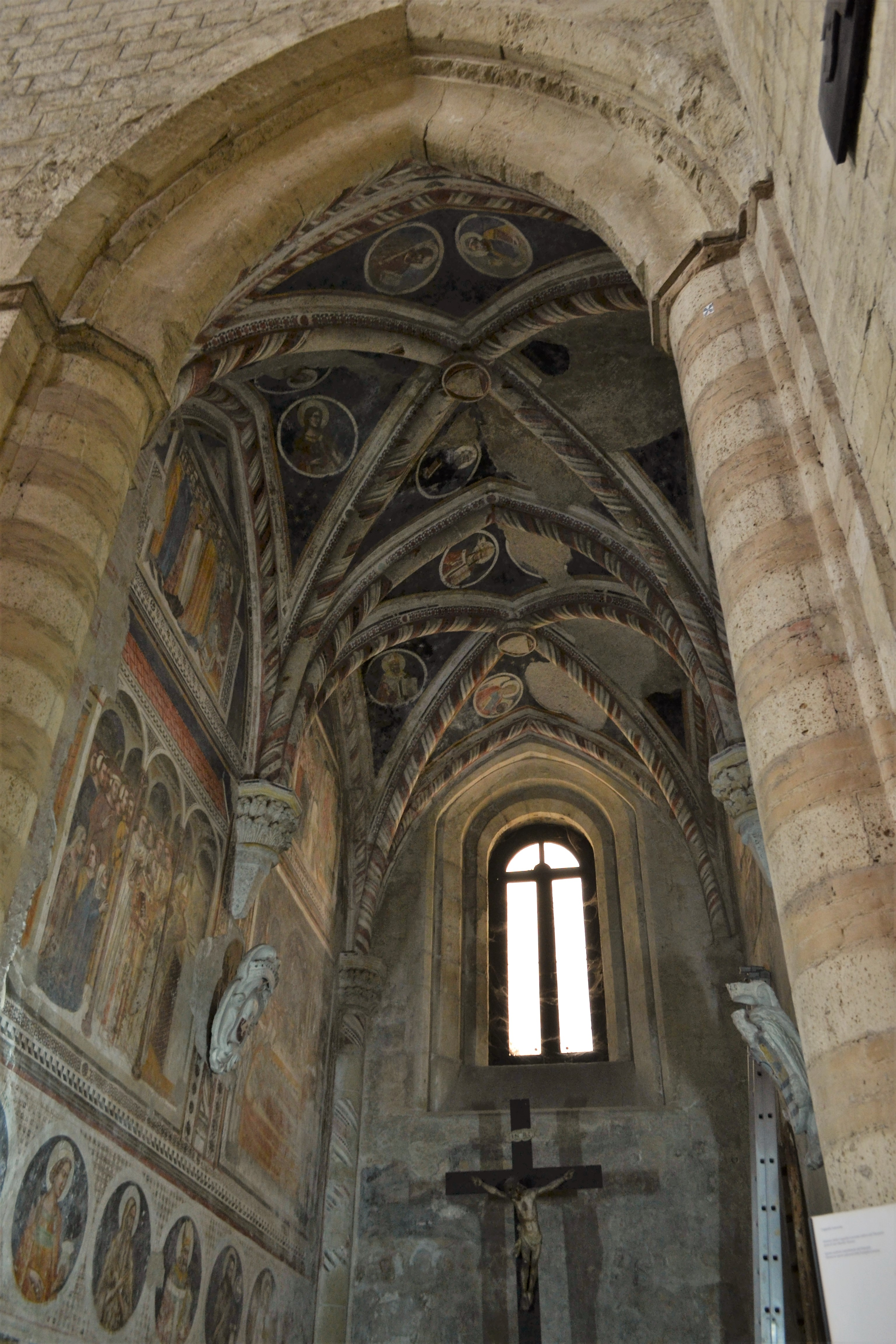 Chiesa di San Pietro a Majella di Napoli - cappella Leonessa